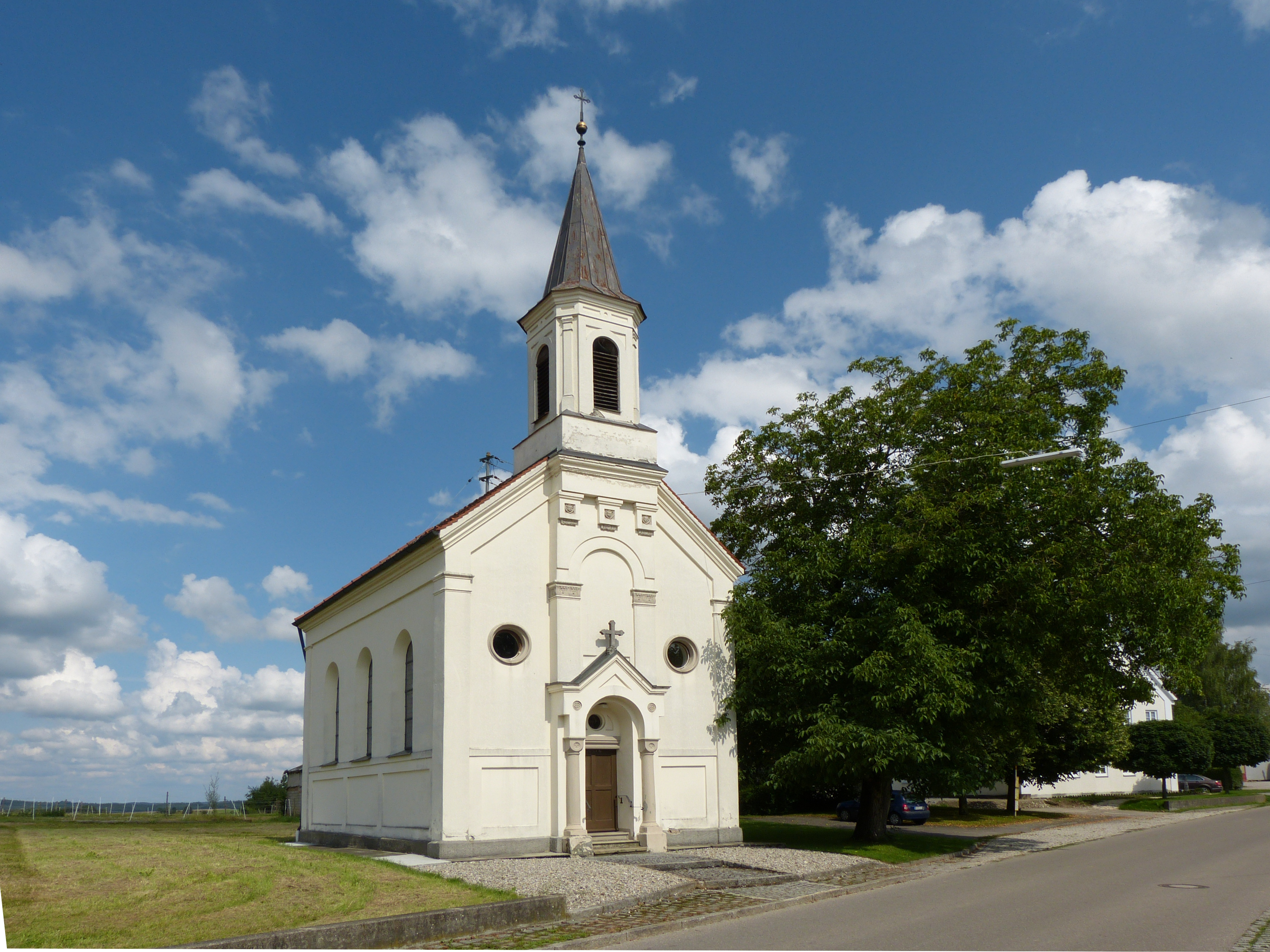 St. Anna (1872) in Spöck, Kirchheim in Schwaben, Landkreis Unterallgäu, Bayern